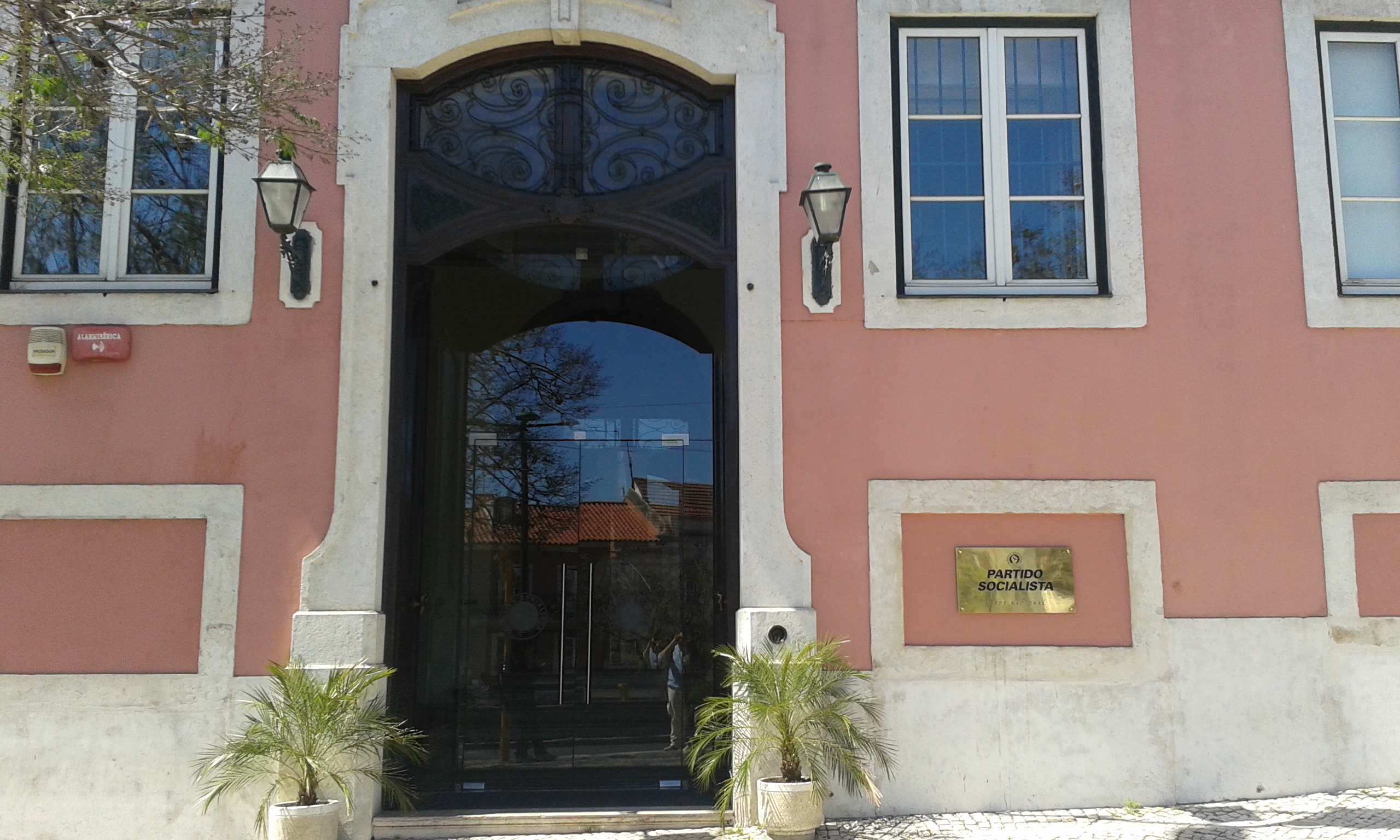 Porte principale du siège national du Parti socialiste portugais, Largo de Rato, photographiée par mes soins le 8 mai 2015.